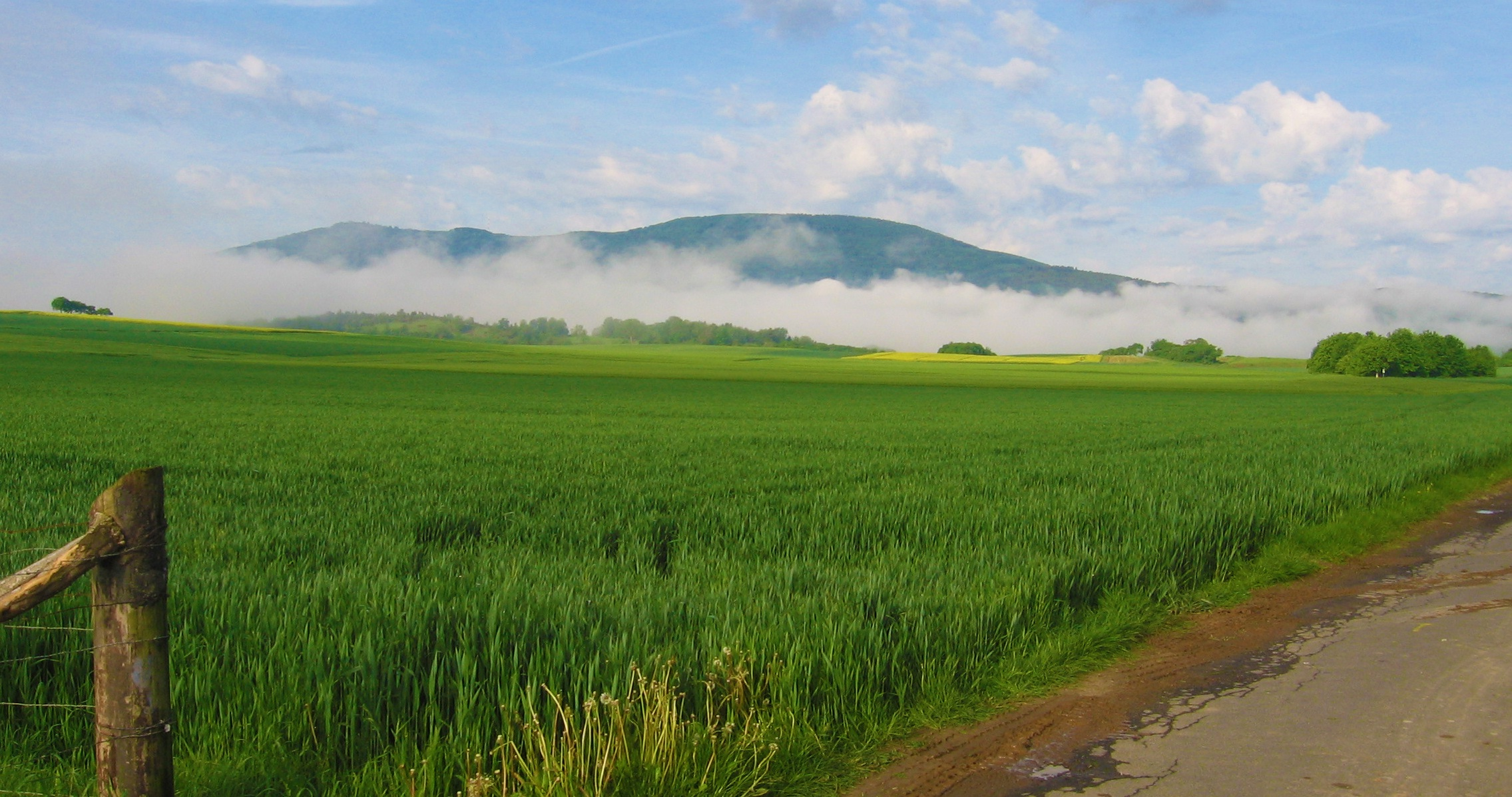 Teil des Hohen Meißner aus Sicht von Orferode (rechts die Kasseler Kuppe und links die Kalbe)